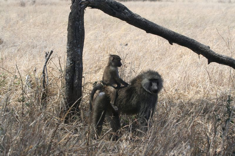 baby baboon riding